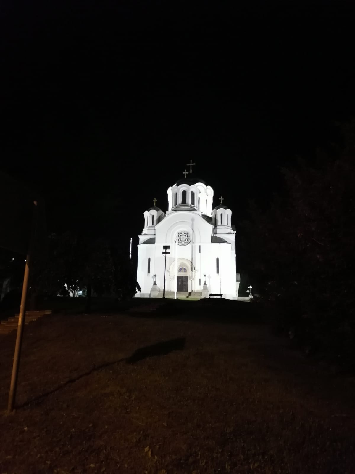 Црква у Лазаревцу (ноћу)